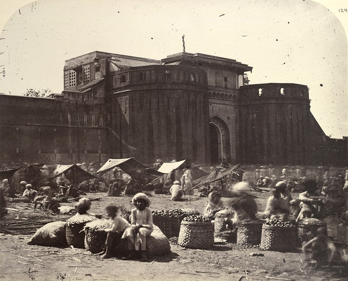 Shaniwarwada in late 1800s